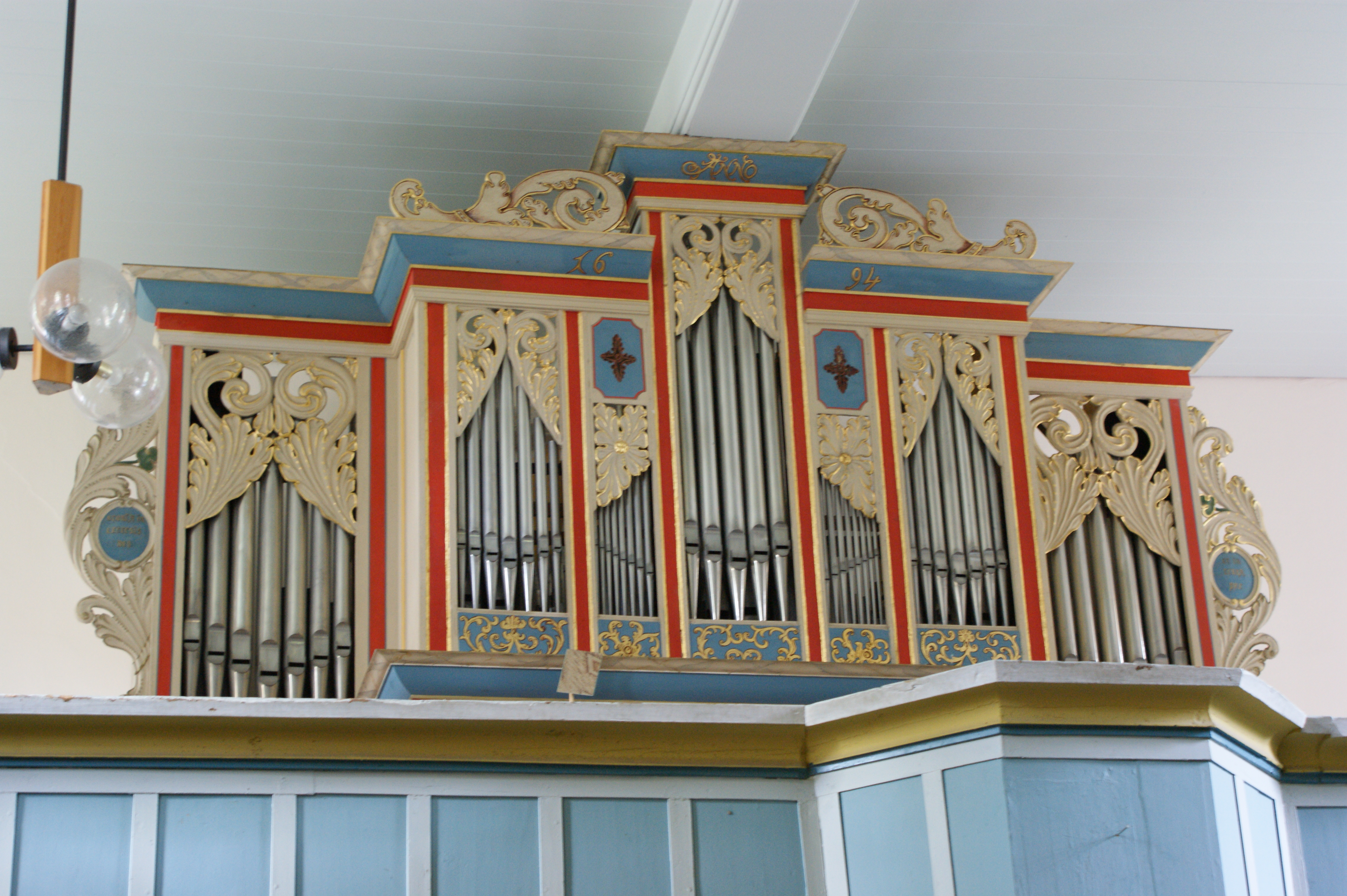 Orgel von 1694 in der Feldsteinkapelle in Teupitz